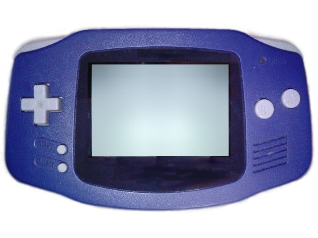 ゲームボーイアドバンス。利用者:sugarによる撮影。ロゴ隠蔽等加工済み。 Category:ゲーム機画像